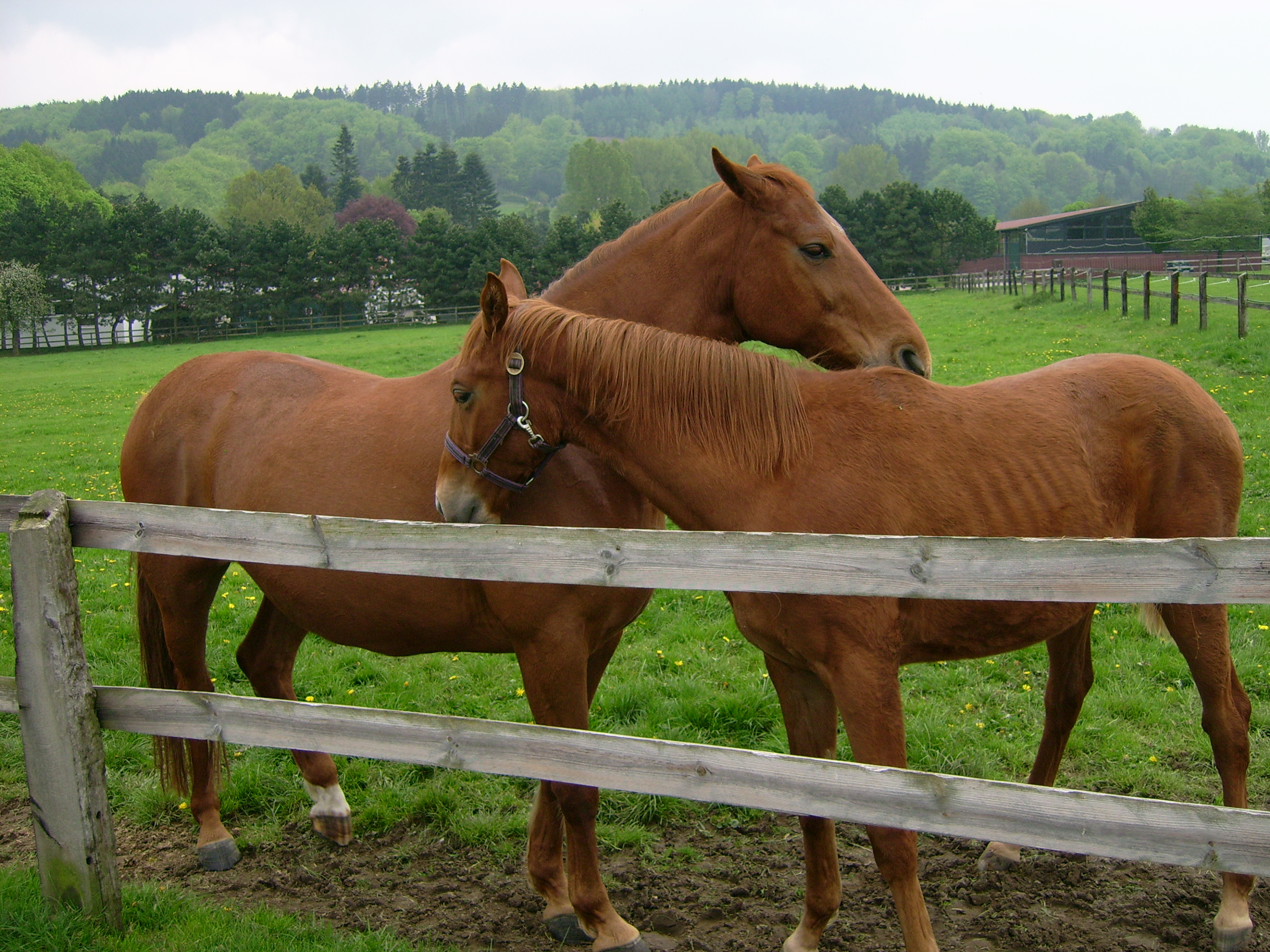 Pferdekoppel vor dem Borgberg in Hagen am Teutoburger Wald